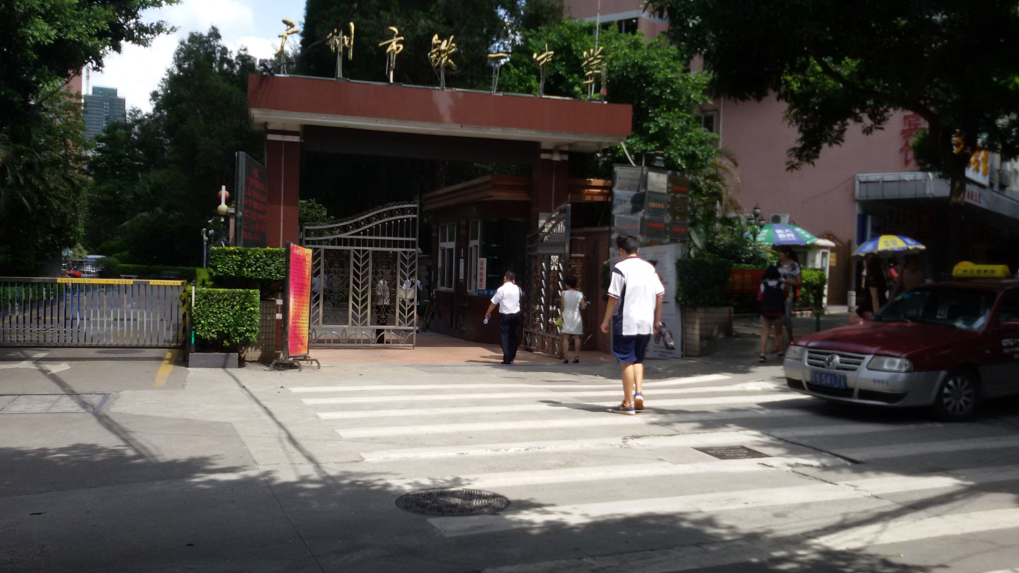 粵語: 廣州市鐵一中學（東山校區）嘅西門，喺2014年8月28號影。